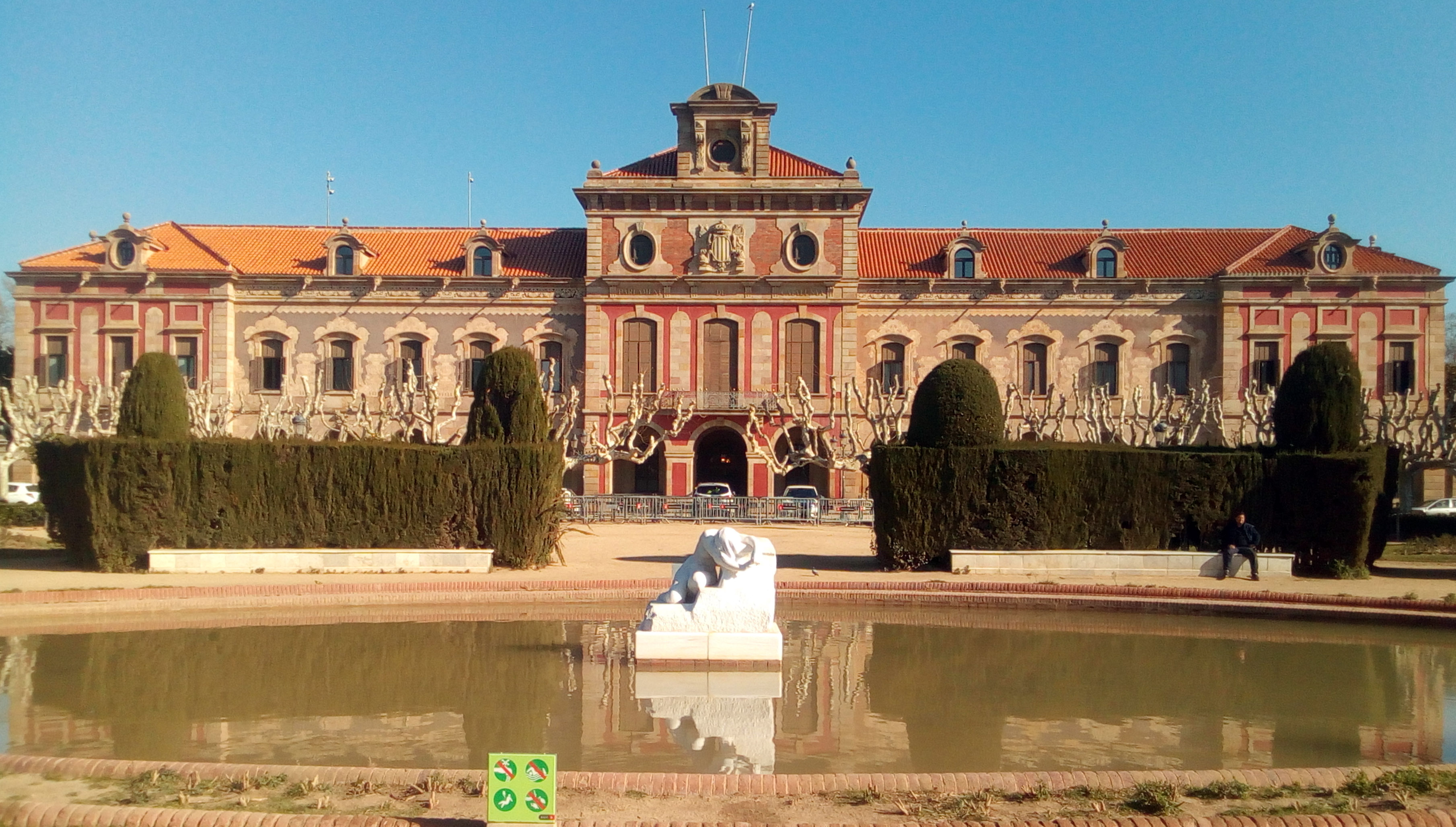 Palacio del Parlamento de Cataluña.